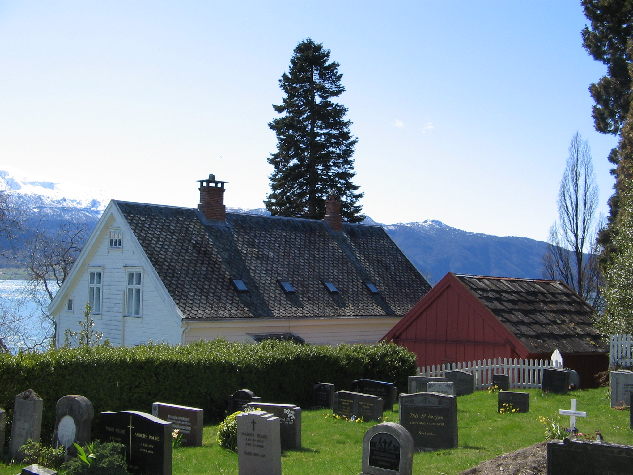 Leikanger prestegard sett frå kyrkja.